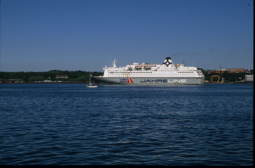 Fährschiff KRONPRINS HARALD (norweg.)